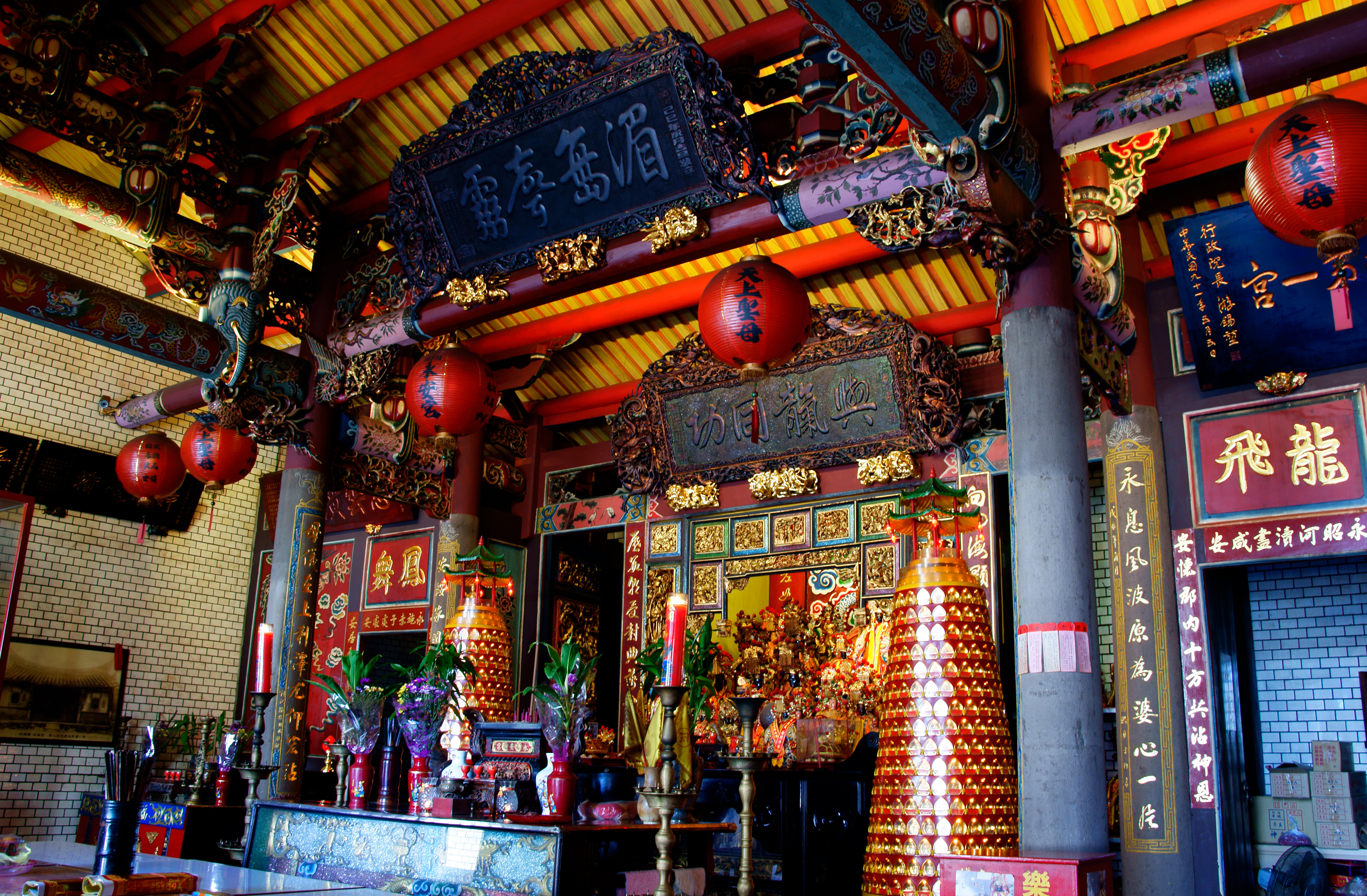 位於利澤老街之內的永安宮，是當地的重心，各個節慶都有重大活動，尤其是過年期間的走尪活動，更是吸引多數鄉民與觀光客